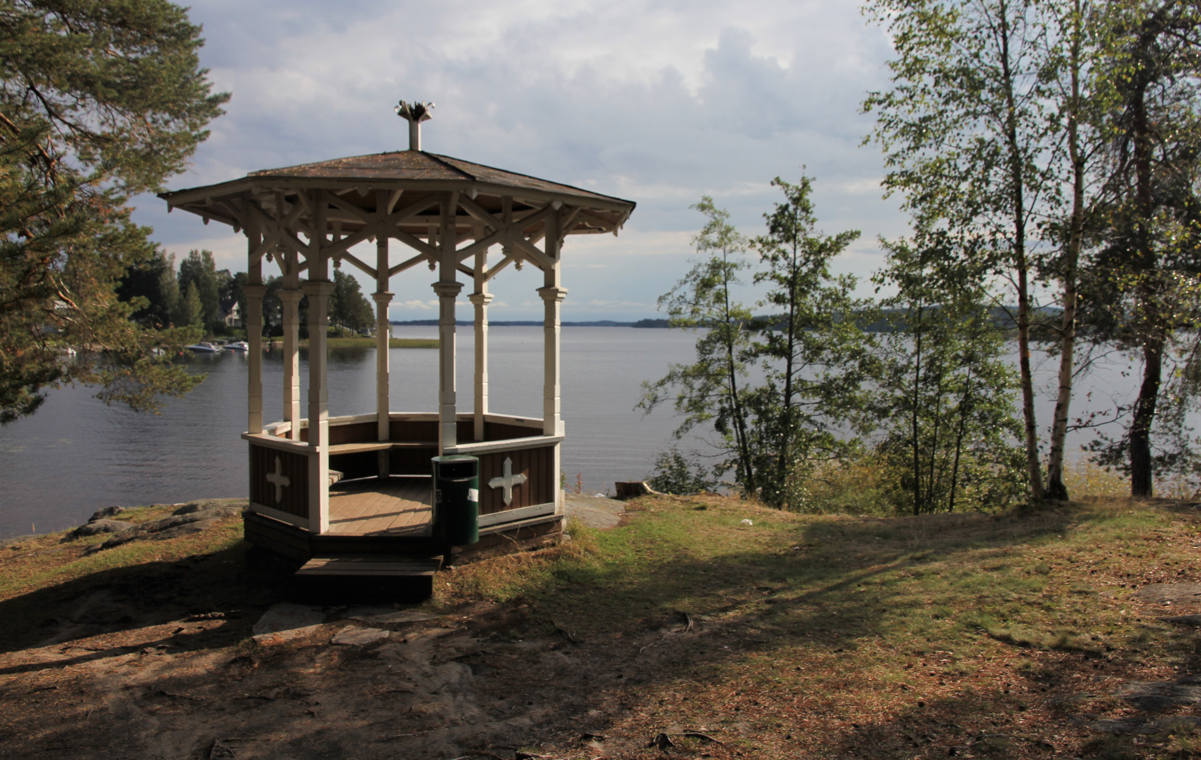 Matkailijayhdistyksen paviljonki (1889) Rönönsalmen rannalla, lähellä Valapaton viivana tunnettua, kallioon hakattuja vedenpinnan korkeuksia osoittavaa luonnontieteellistä muistomerkkiä, Kuopion keskustan kaupunginosiin kuuluvalla Väinölänniemellä.